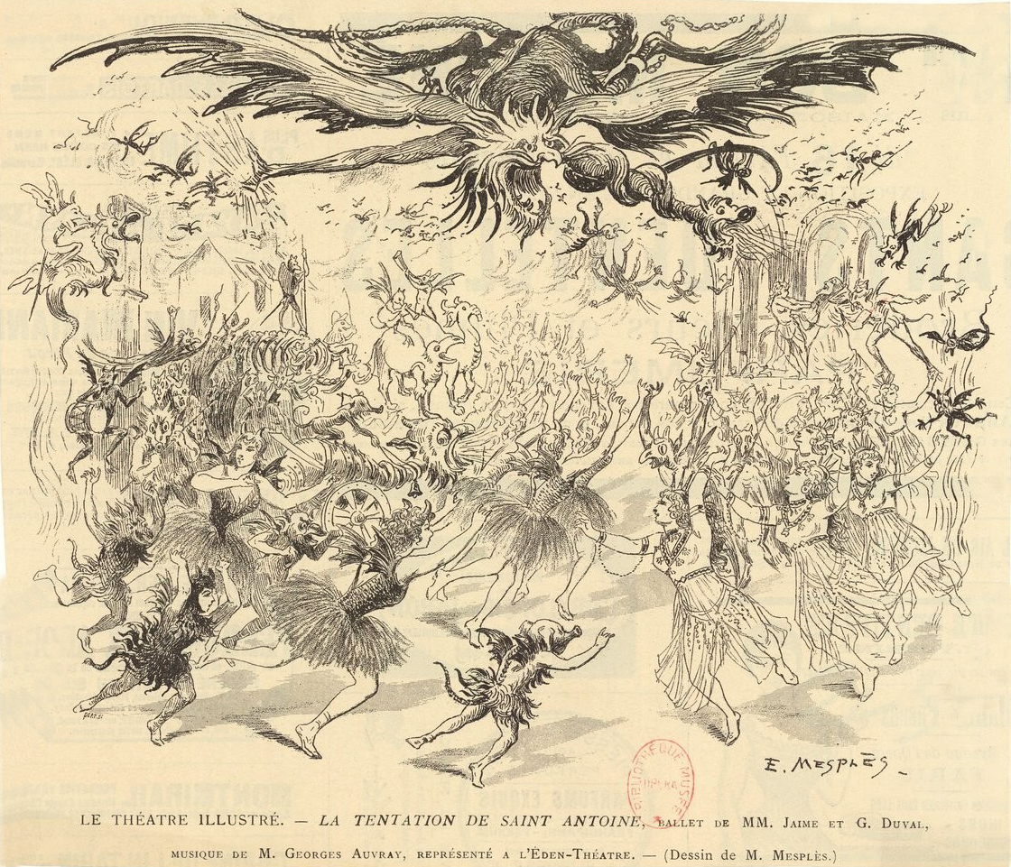 La tentation de Saint Antoine